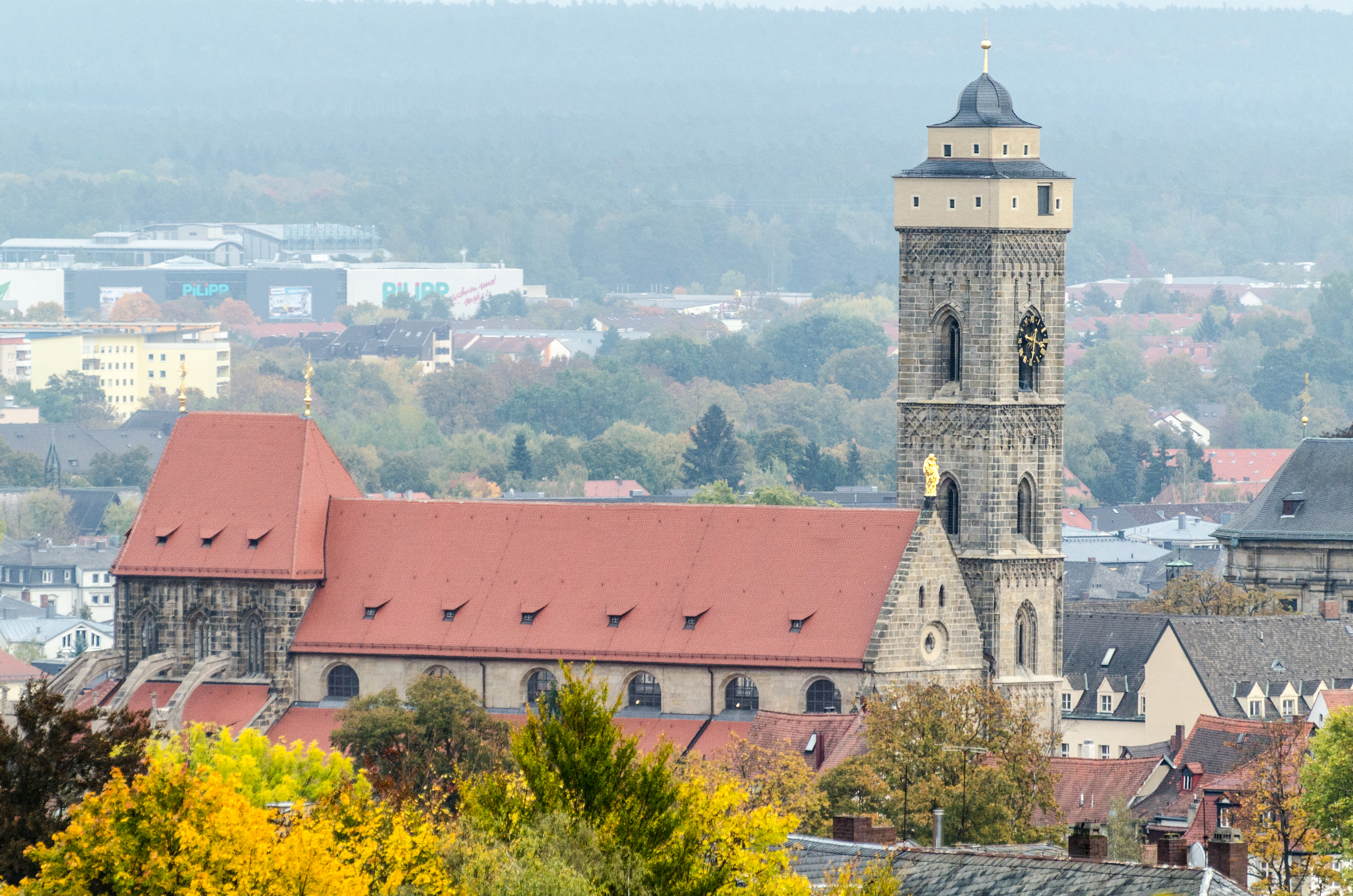 Bamberg, Obere Pfarre, Ansicht von der Villa Remeis